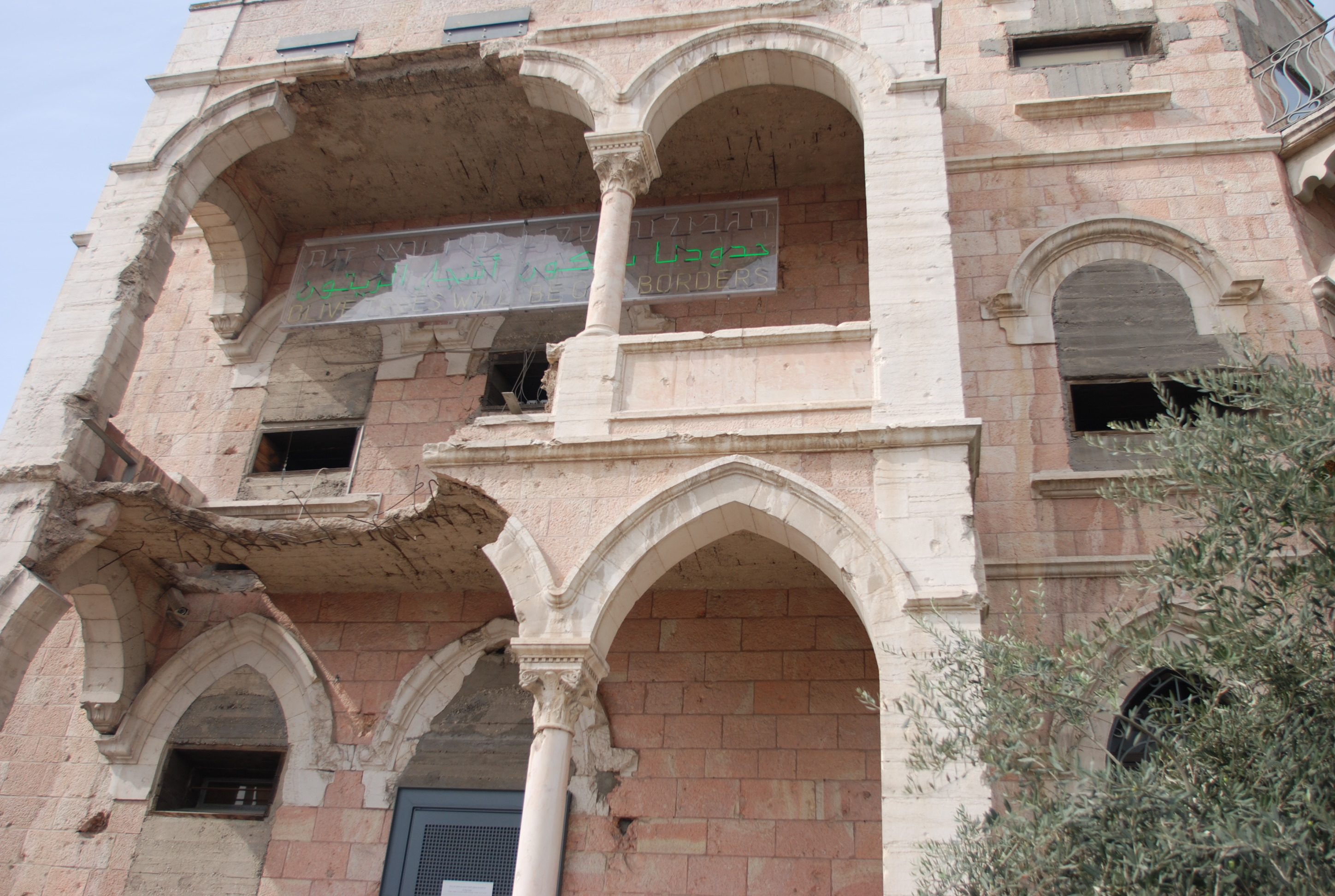 מוזיאון על התפר- חזית